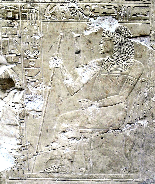 Grab des Ramose (TT55), Zeit des Amenophis III. und Echnaton, in Scheich Abd el-Gurna